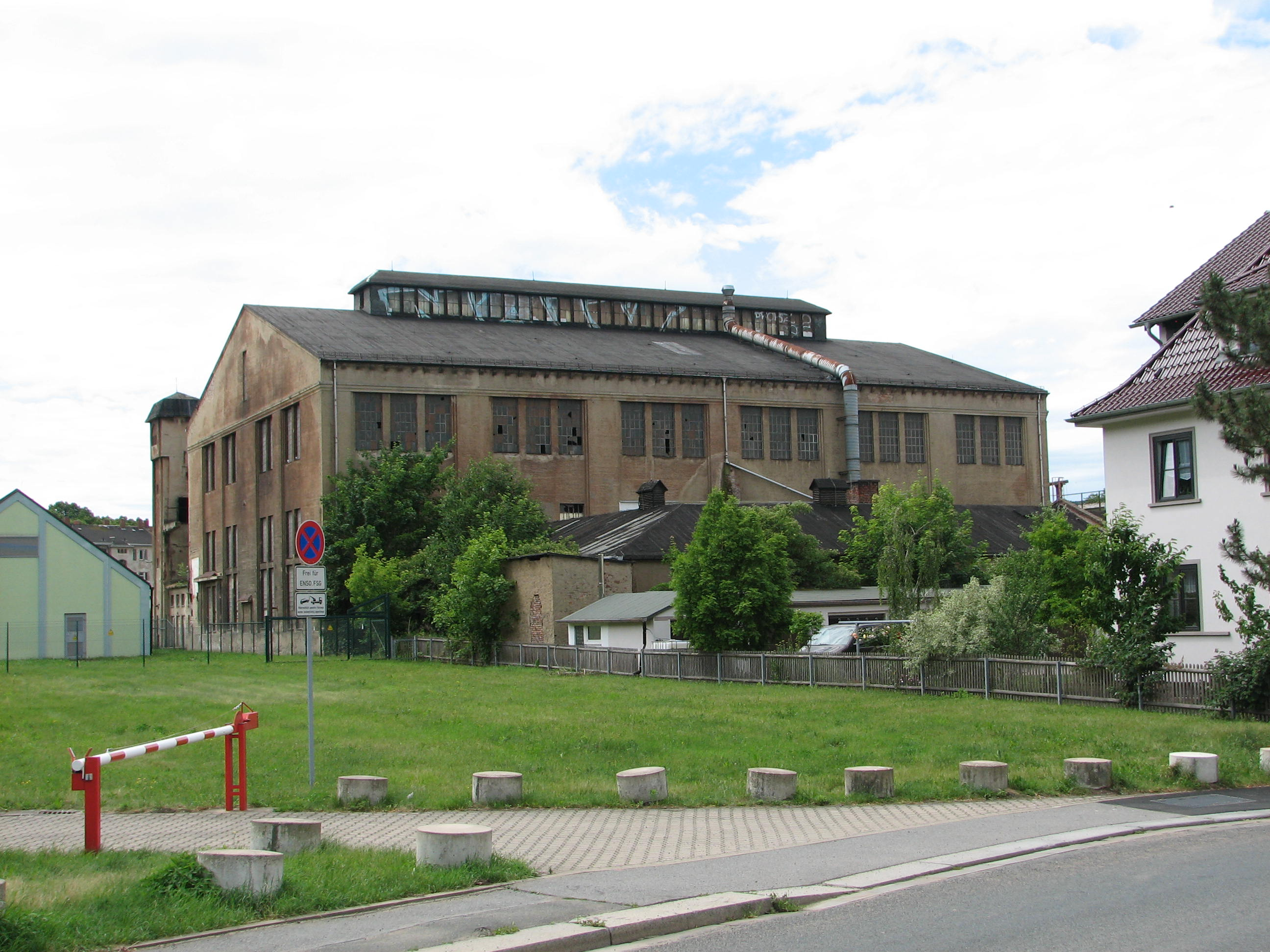 Die denkmalgeschützte Kraftwerkshalle in Freital-Döhlen 1895—2012/13 von Norden.